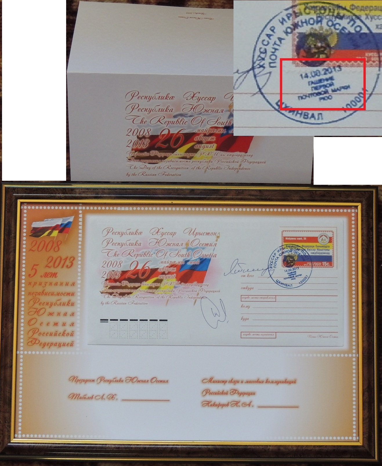 Первая марка Республики Южная Осетия